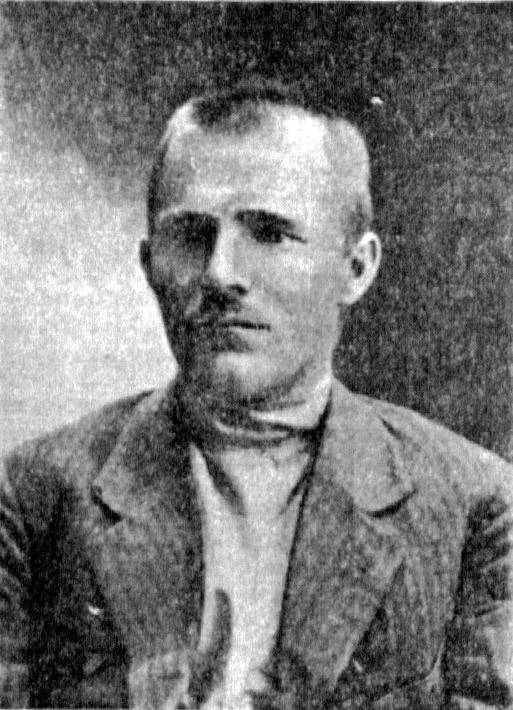 Сергушев Михаил Сергеевич (Аксёнов Маркел Прокопьевич) (1886-1930)— участник революционного движения в России.